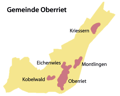 Übersichtskarte der Gemeinde Oberriet